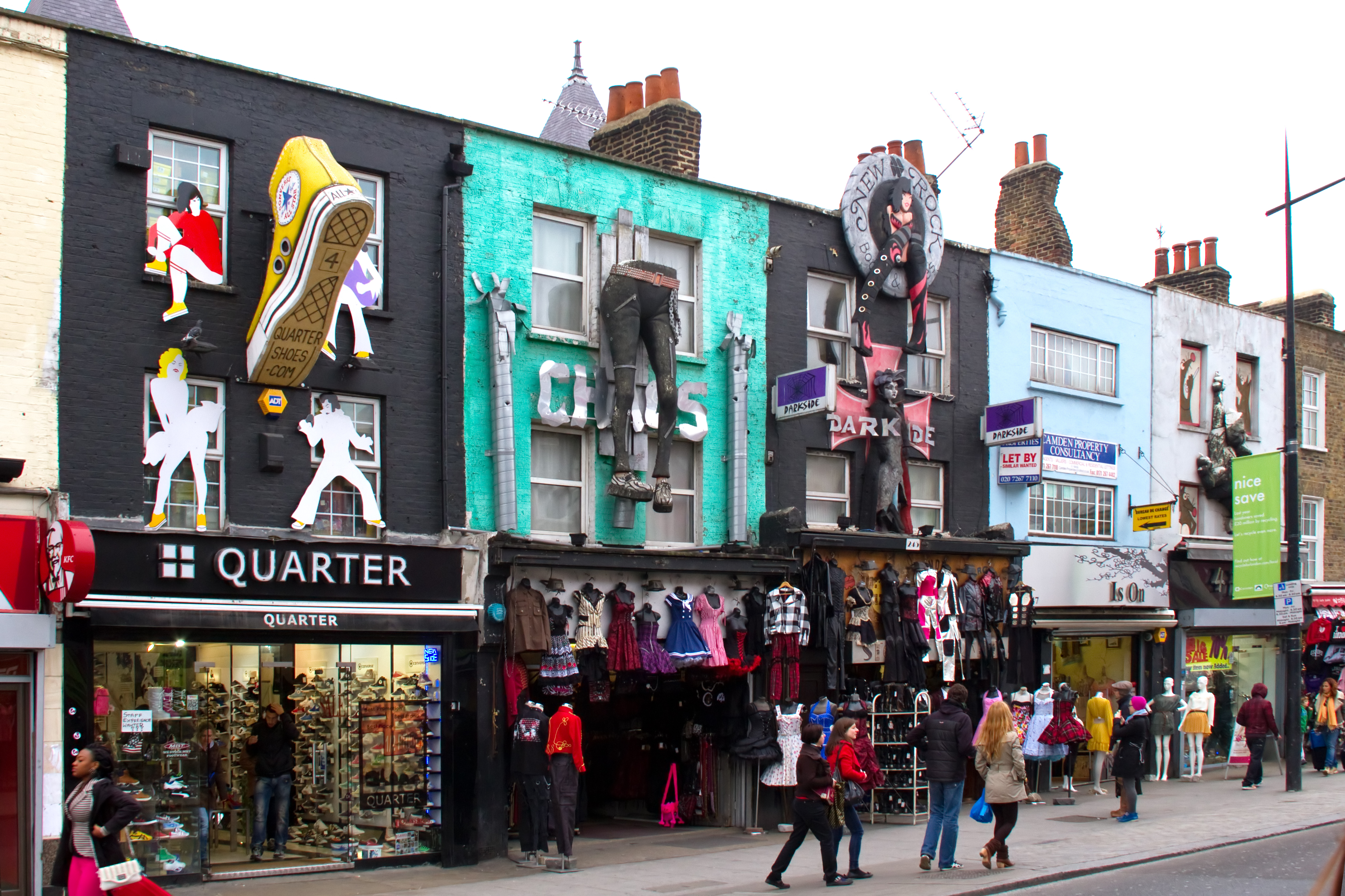 Camden 3